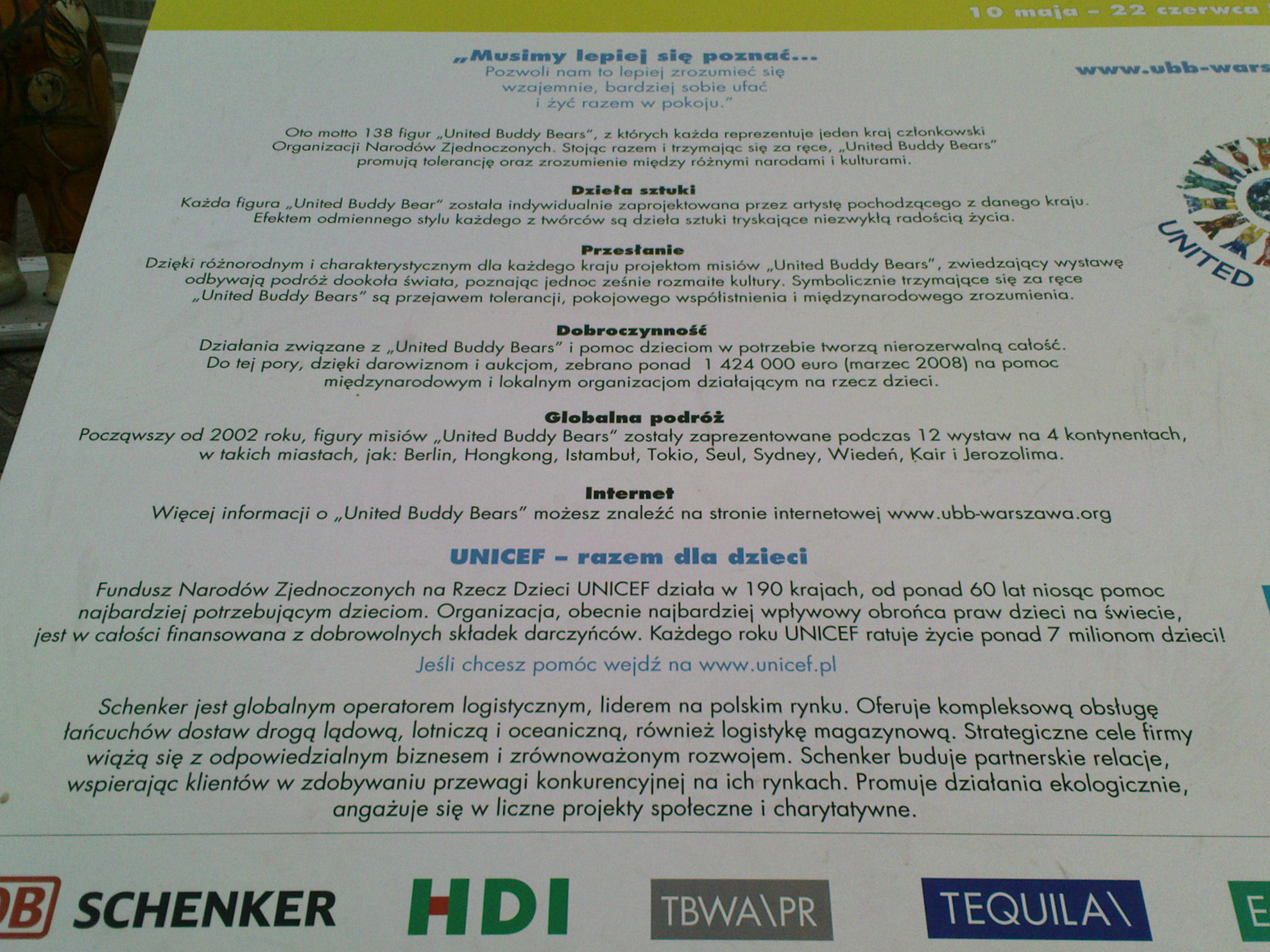 United Buddy Bears Exhibition in Warsaw